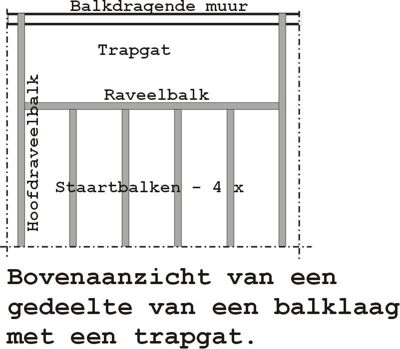 Picture made by Martink